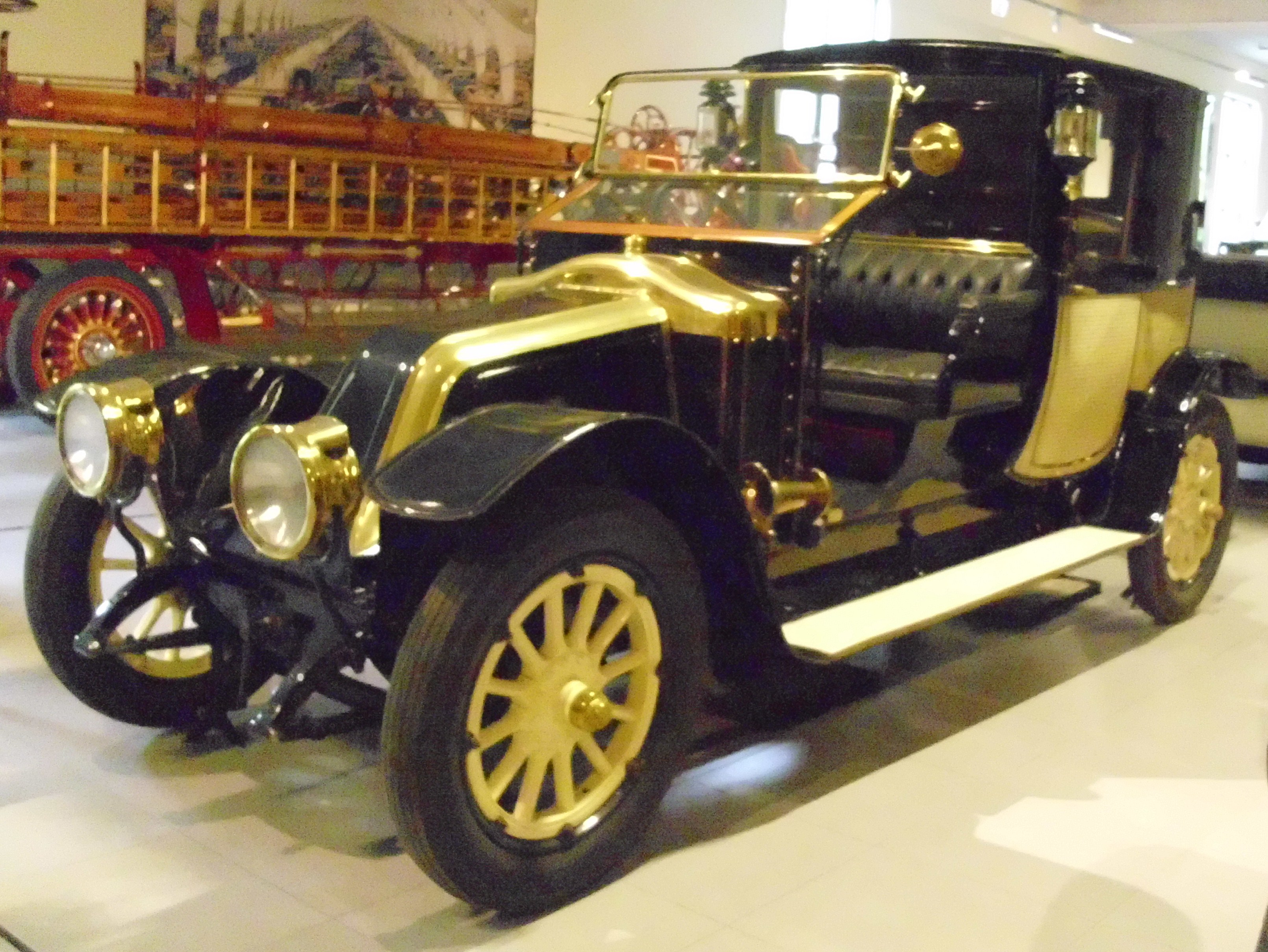 Renault Type DP Coupé-Chauffeur von Mühlbacher 1913